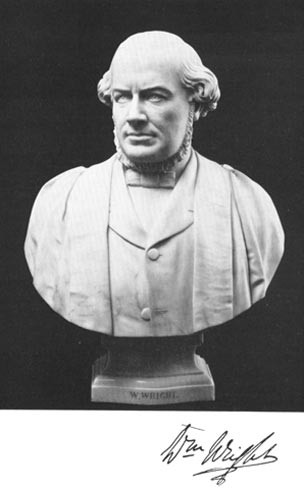 Bust of William Wright, orientalist, 1830–1889